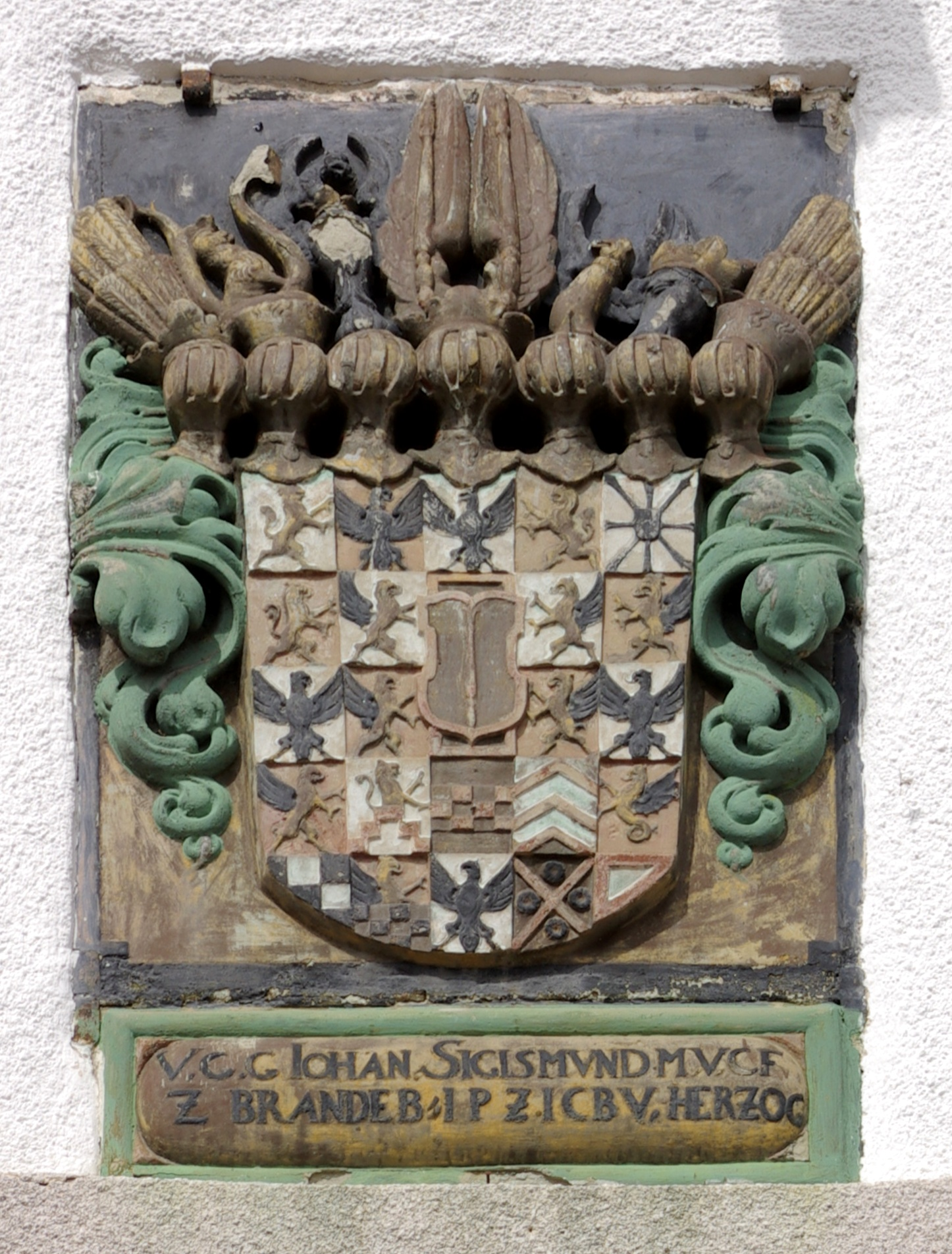 Srokowo